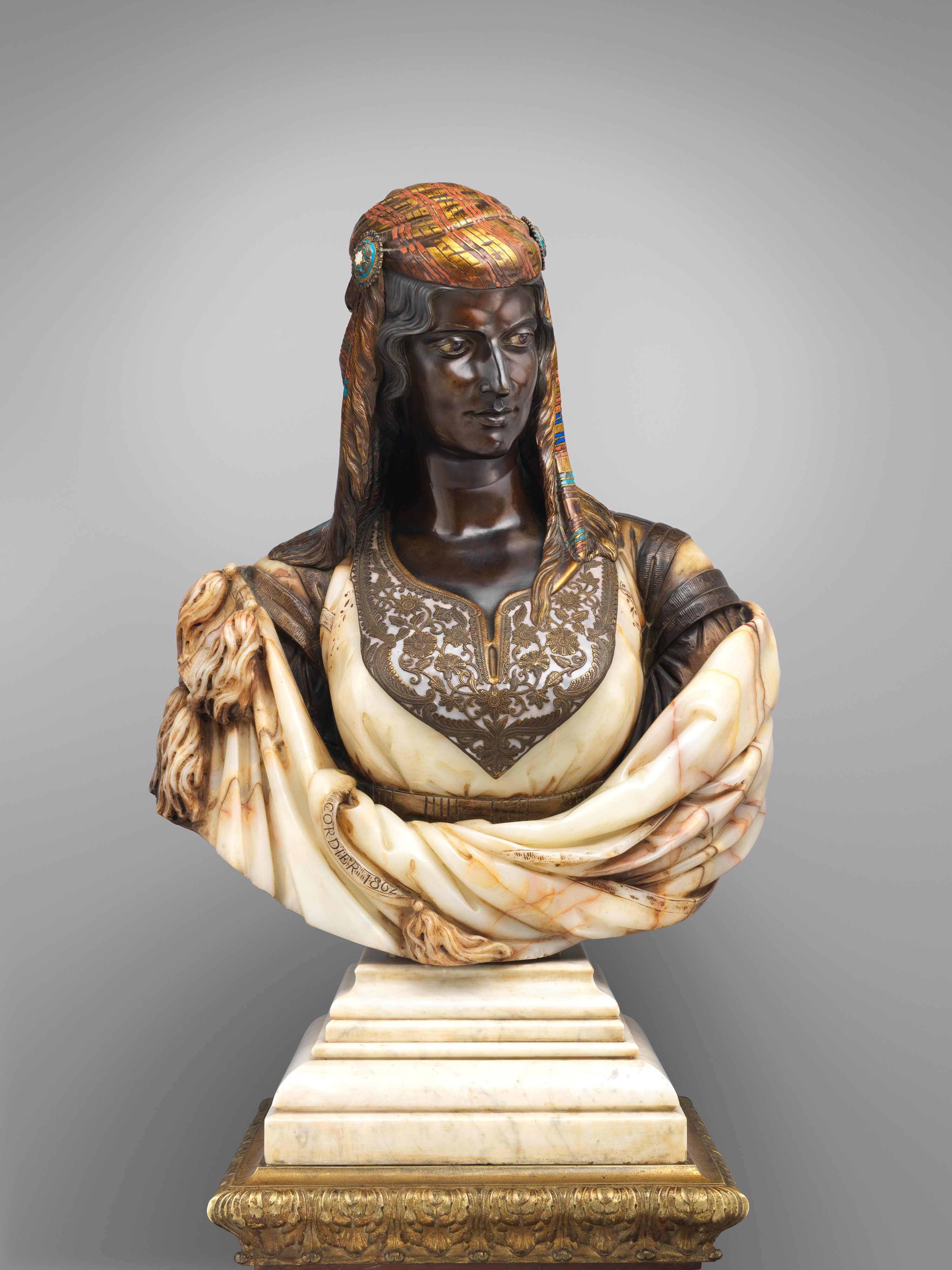 French, Paris; Bust; Sculpture